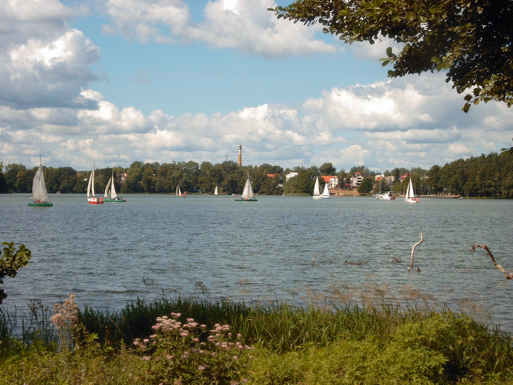 Ruciane-Nida_in_Poland